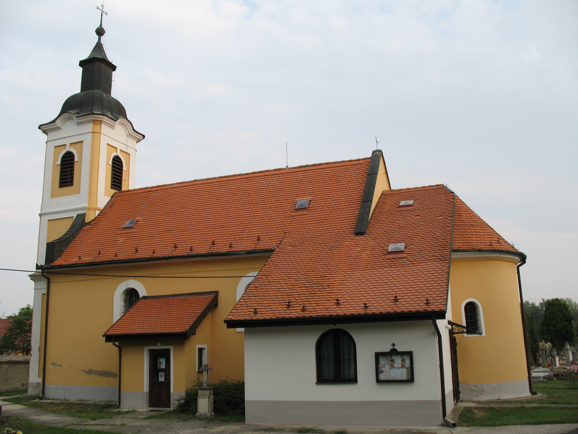 templom